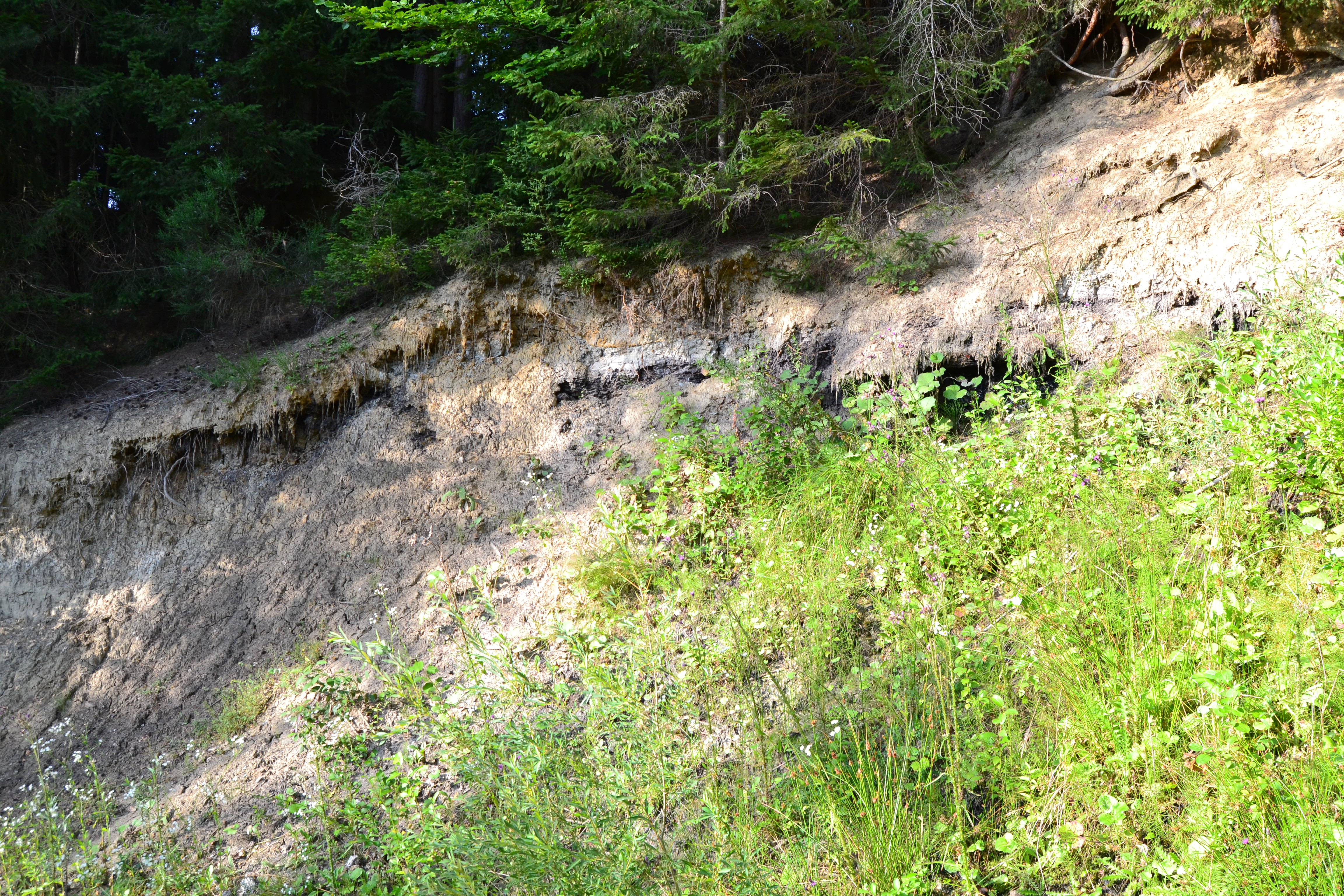 teilweise zugewachsener Aufschluss von Osten